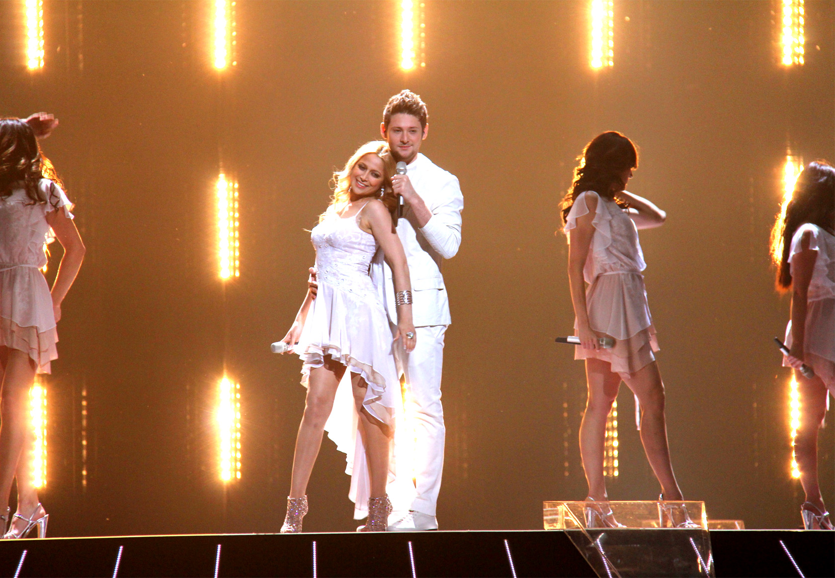 Gewinner des ESC 2011 Aserbaidschan